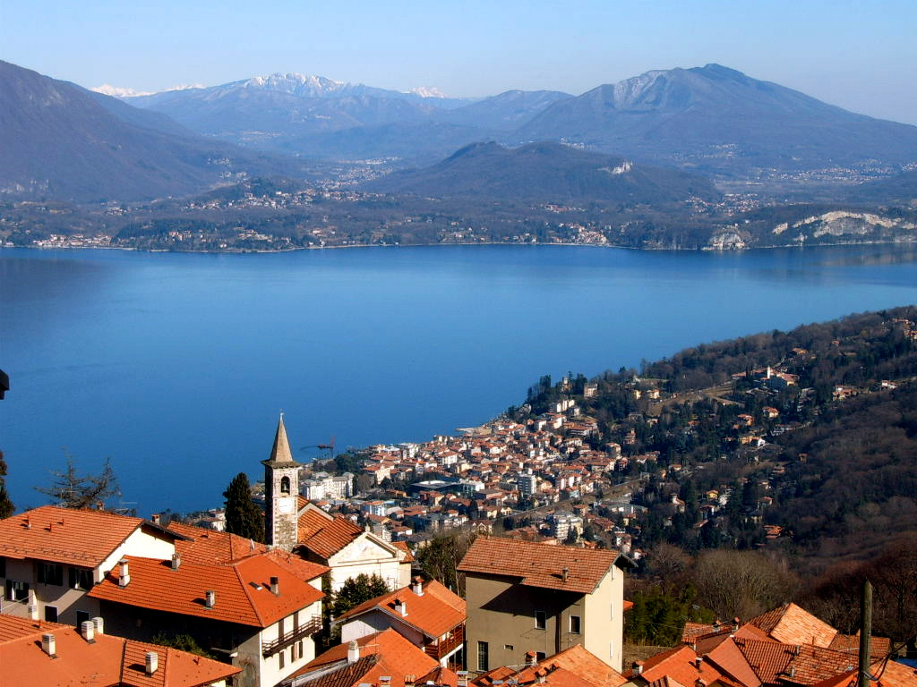 Levo above Stresa, Lake Maggiore (Italy)